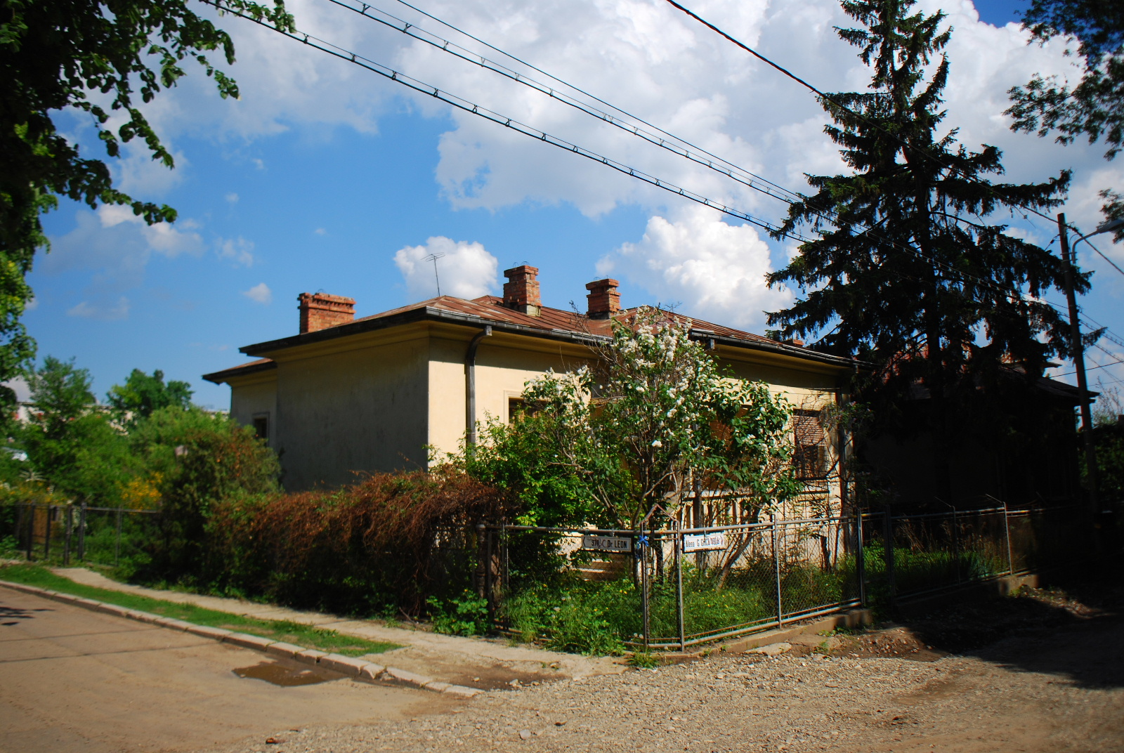 Casa Ștefan Procopiu